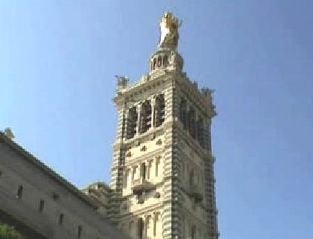 Marseille, Notre Dame de la Garde1